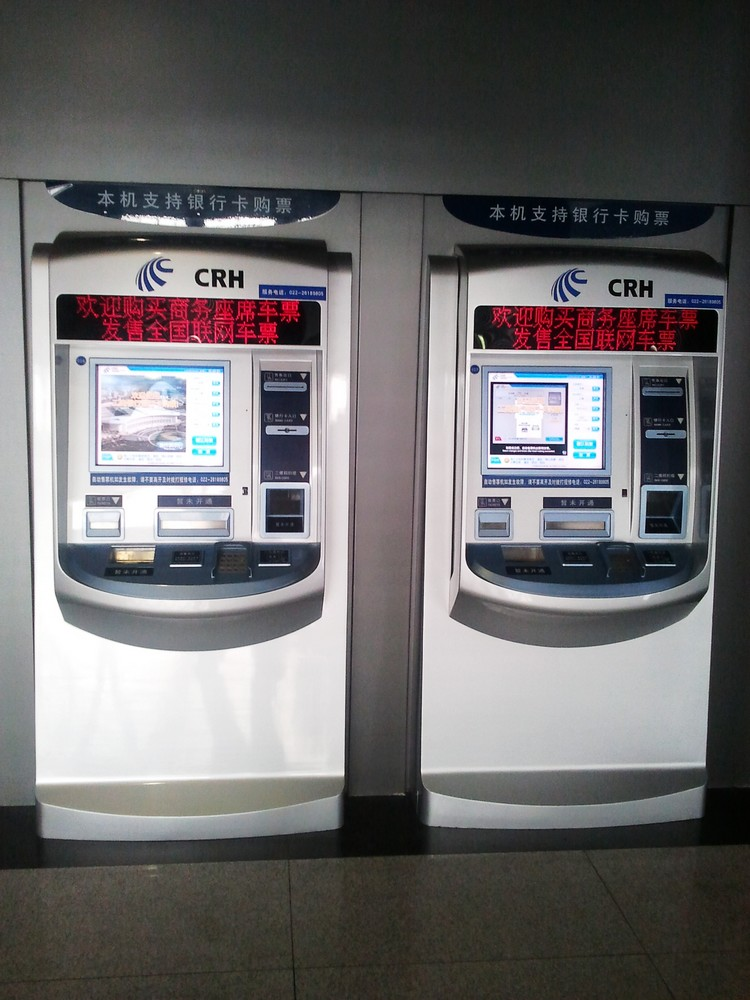 天津西站自助售票机